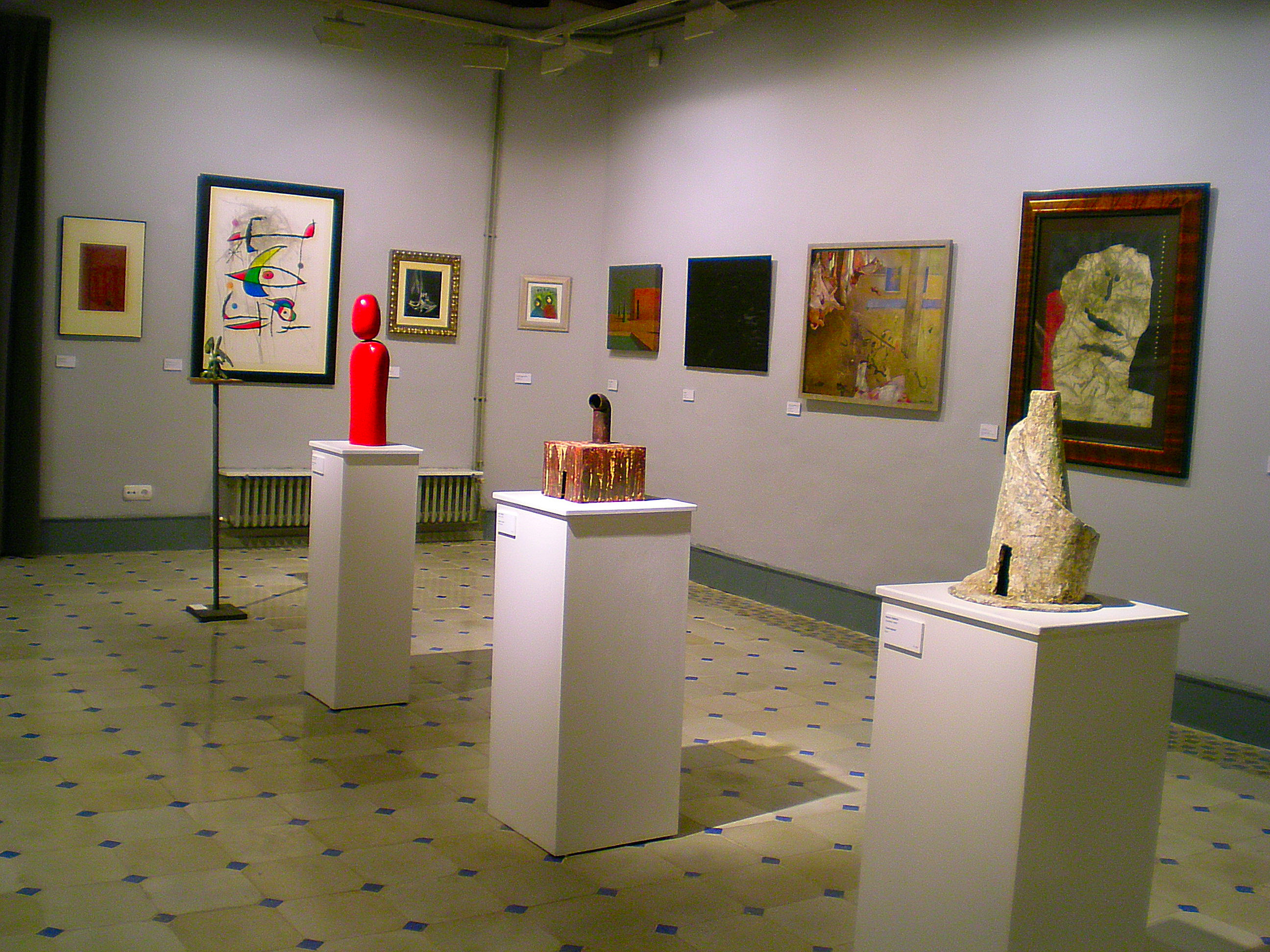 Sala de la Pinacoteca del Museu Arxiu de Sant Andreu de Llavaneres